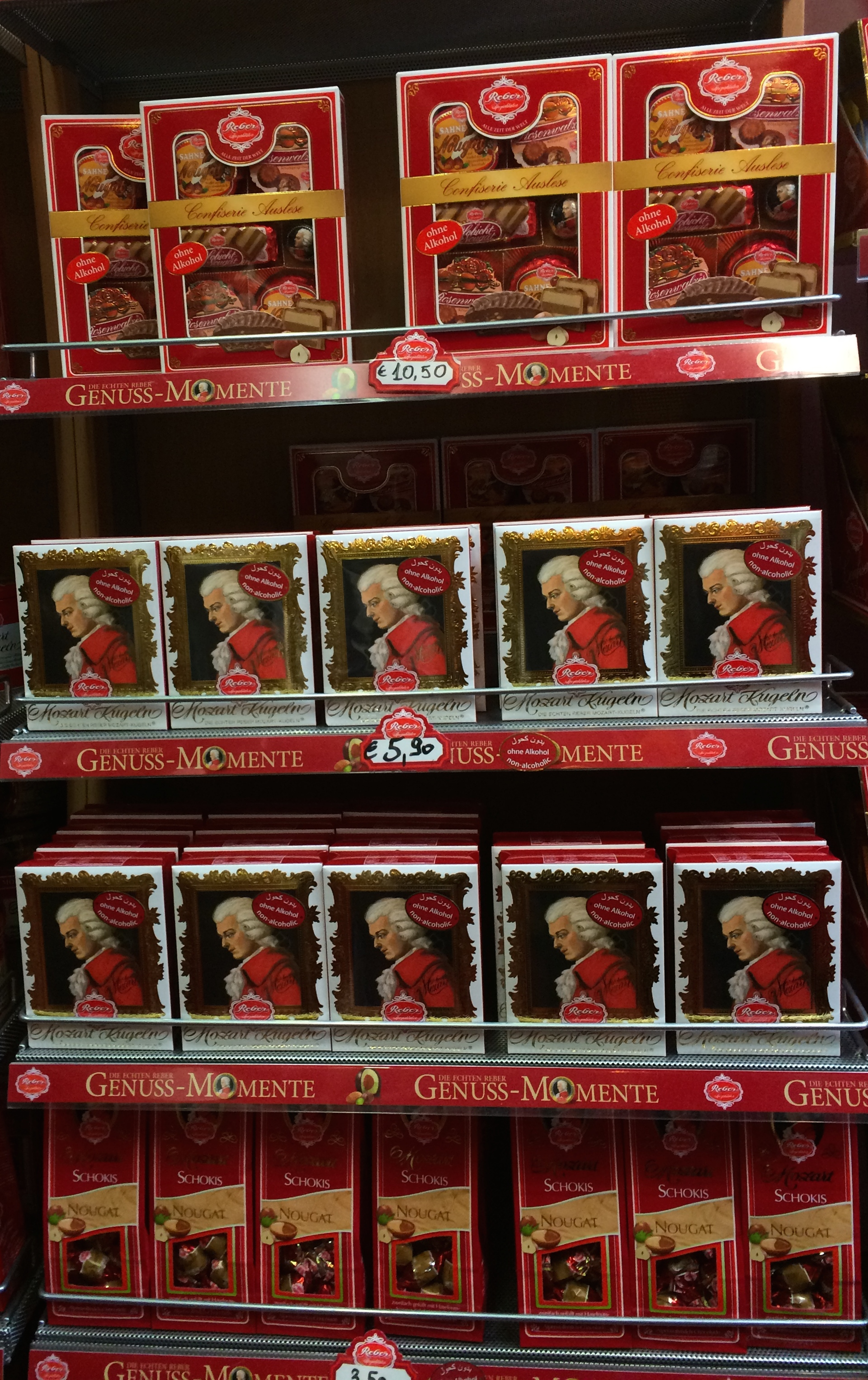 Mozartkugel Verkauf in Salzburg